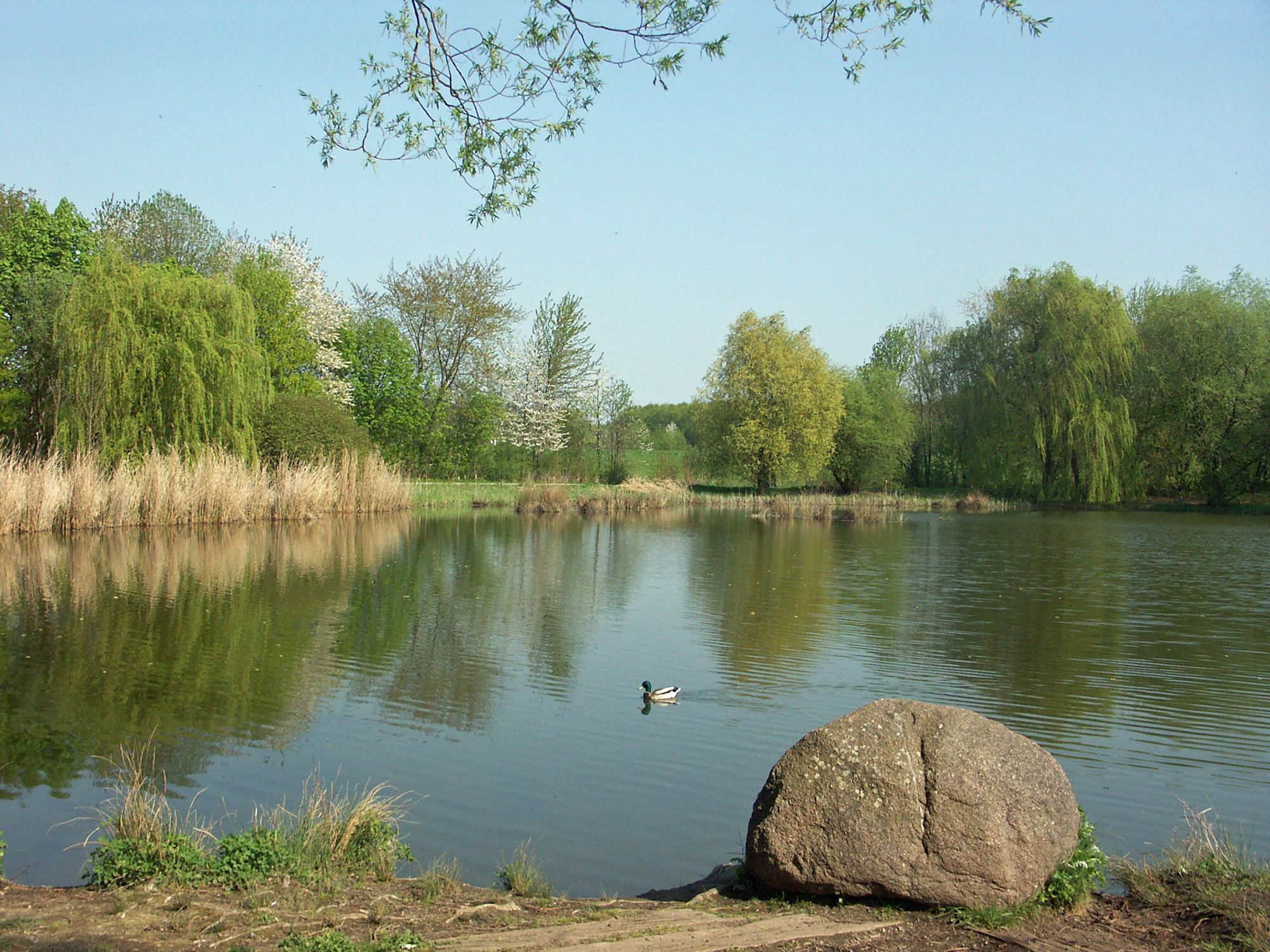 Der Silbersee im Erholungspark Lößnig-Dölitz